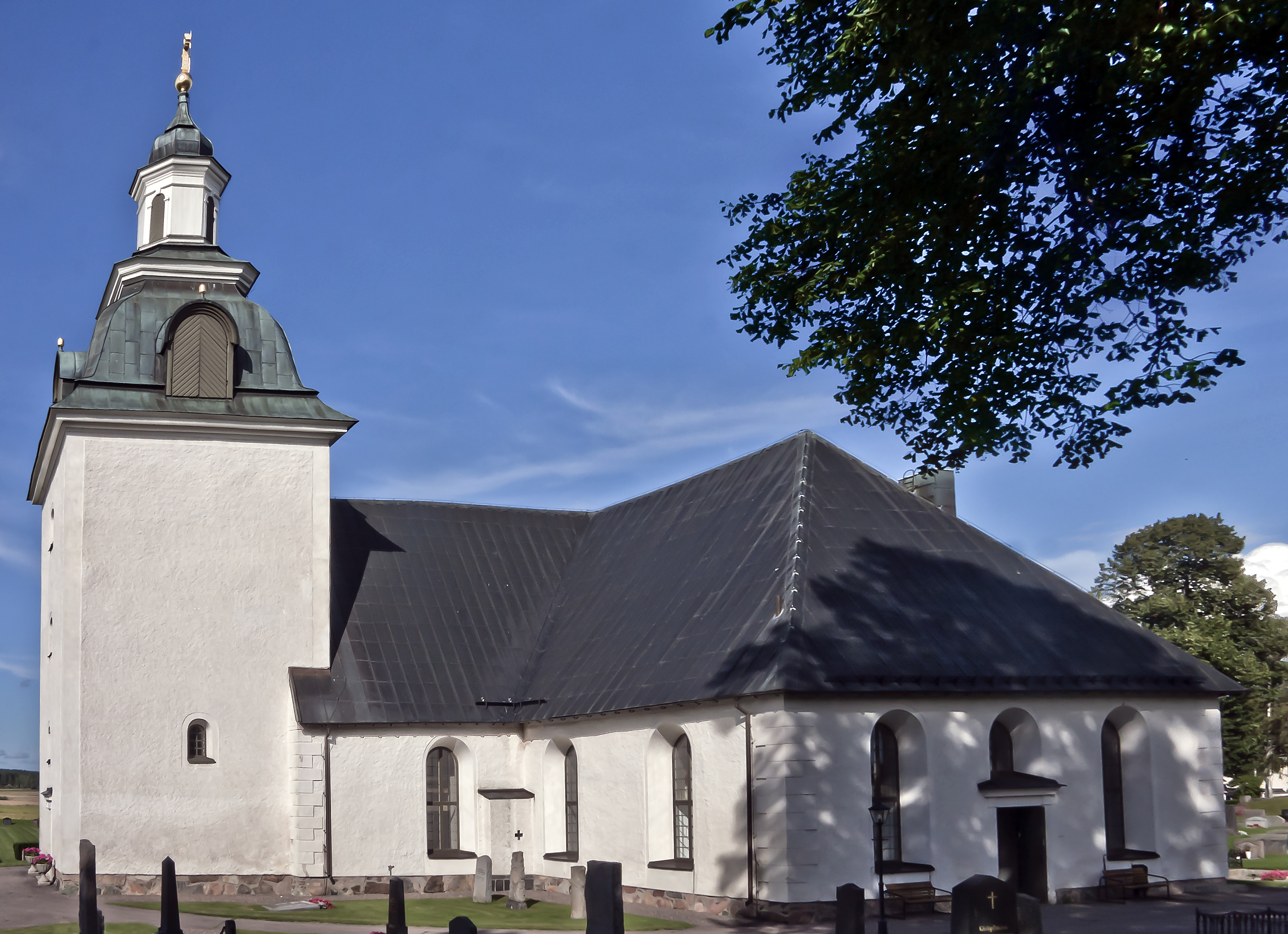 Tjällmo kyrka utanför Motala.